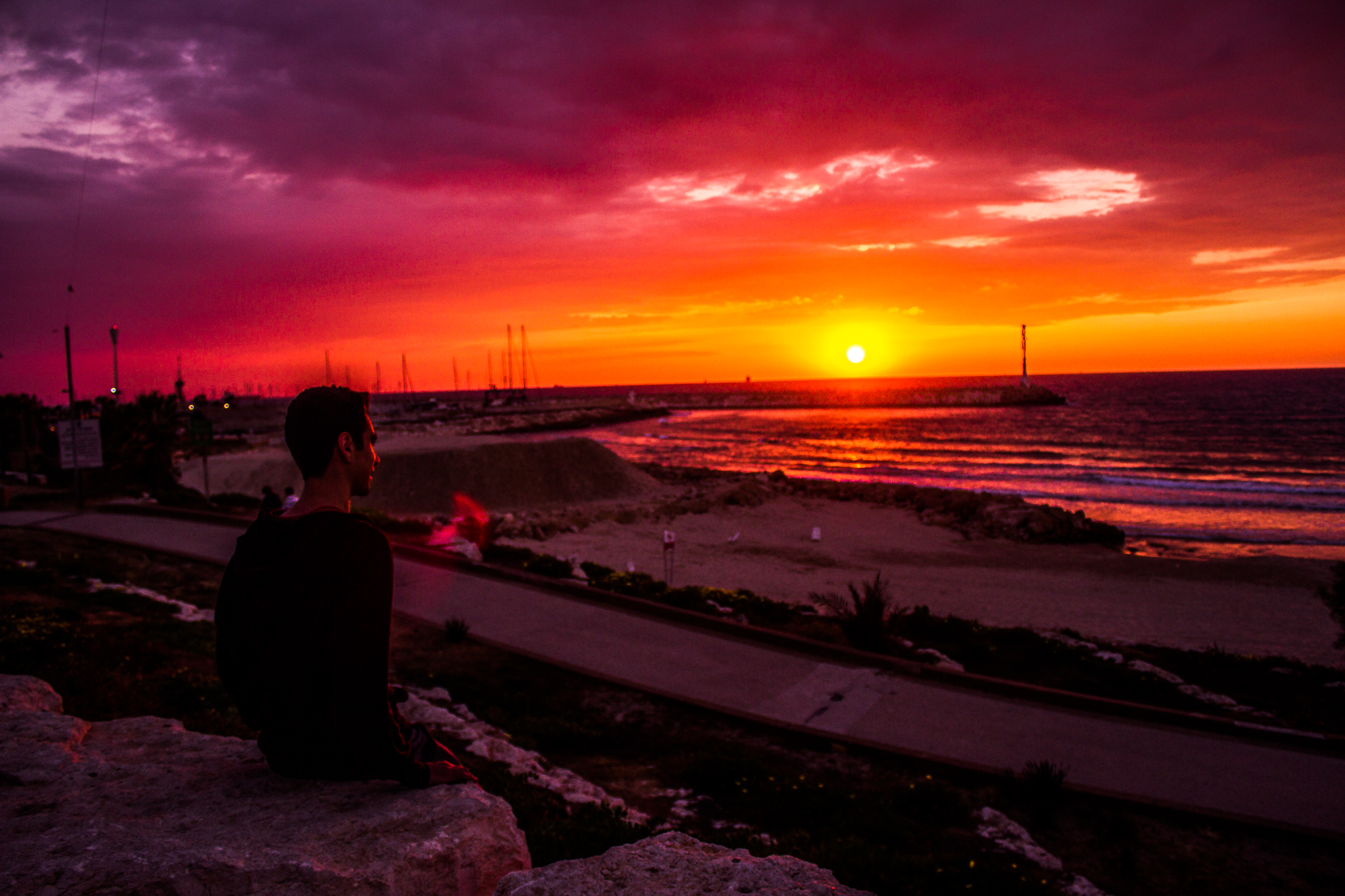 צילום נוף - תמונה לעבר השקיעה באשקלון, ישראל.